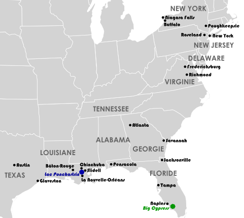 Principaux lieux mentionnés dans Le Costume du mort